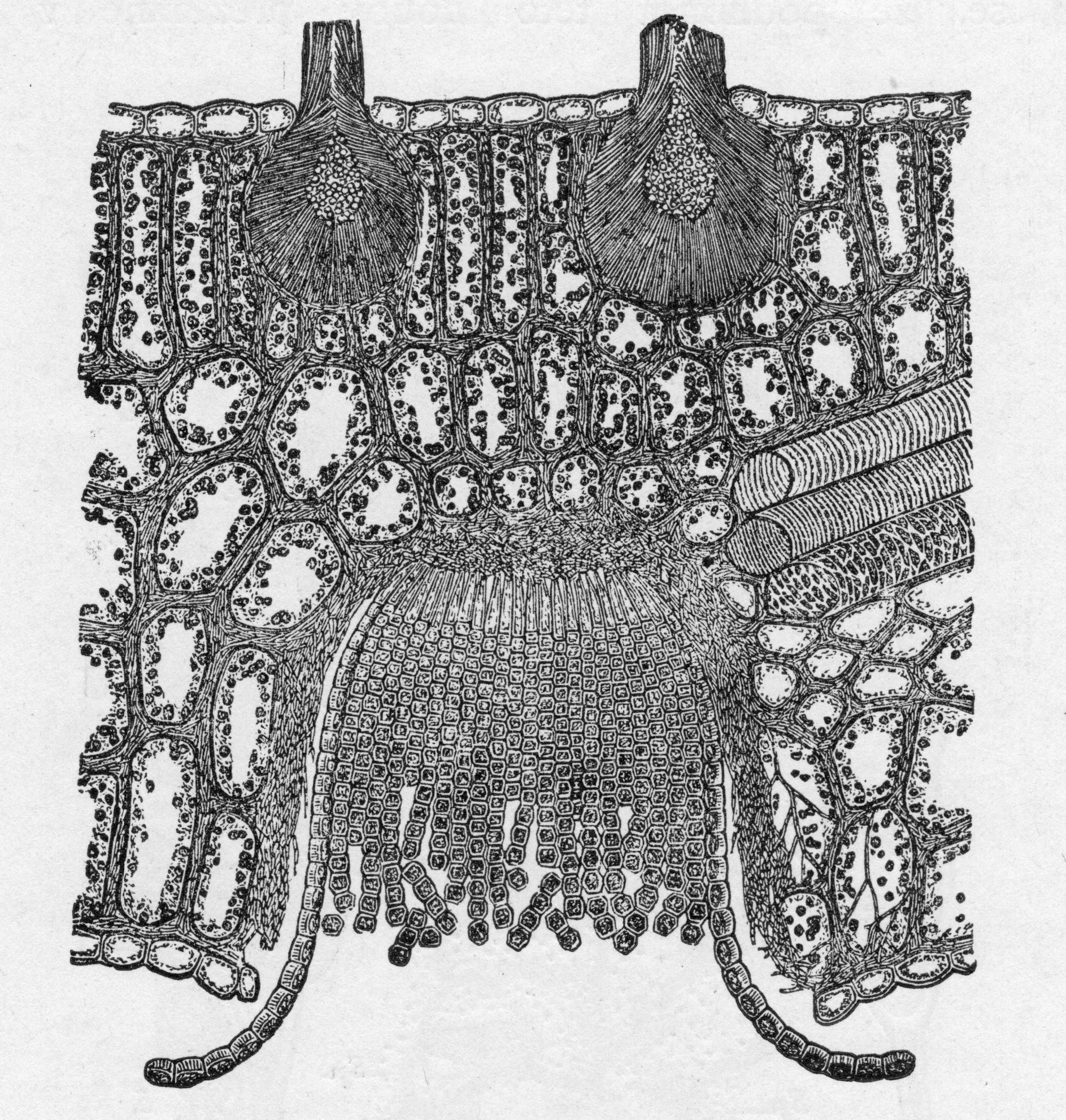 Rez travní na dřišťálu, ilustrace A. J. Bernarda z roku 1901. Originální popis: „Příčný řez listem dřišťálovým; nahoře jsou dvě spermogonie, pak buňky naplněné chlorofyllem; dole aecidie s vlákny houbovými, která odškrcují výtrusy.“